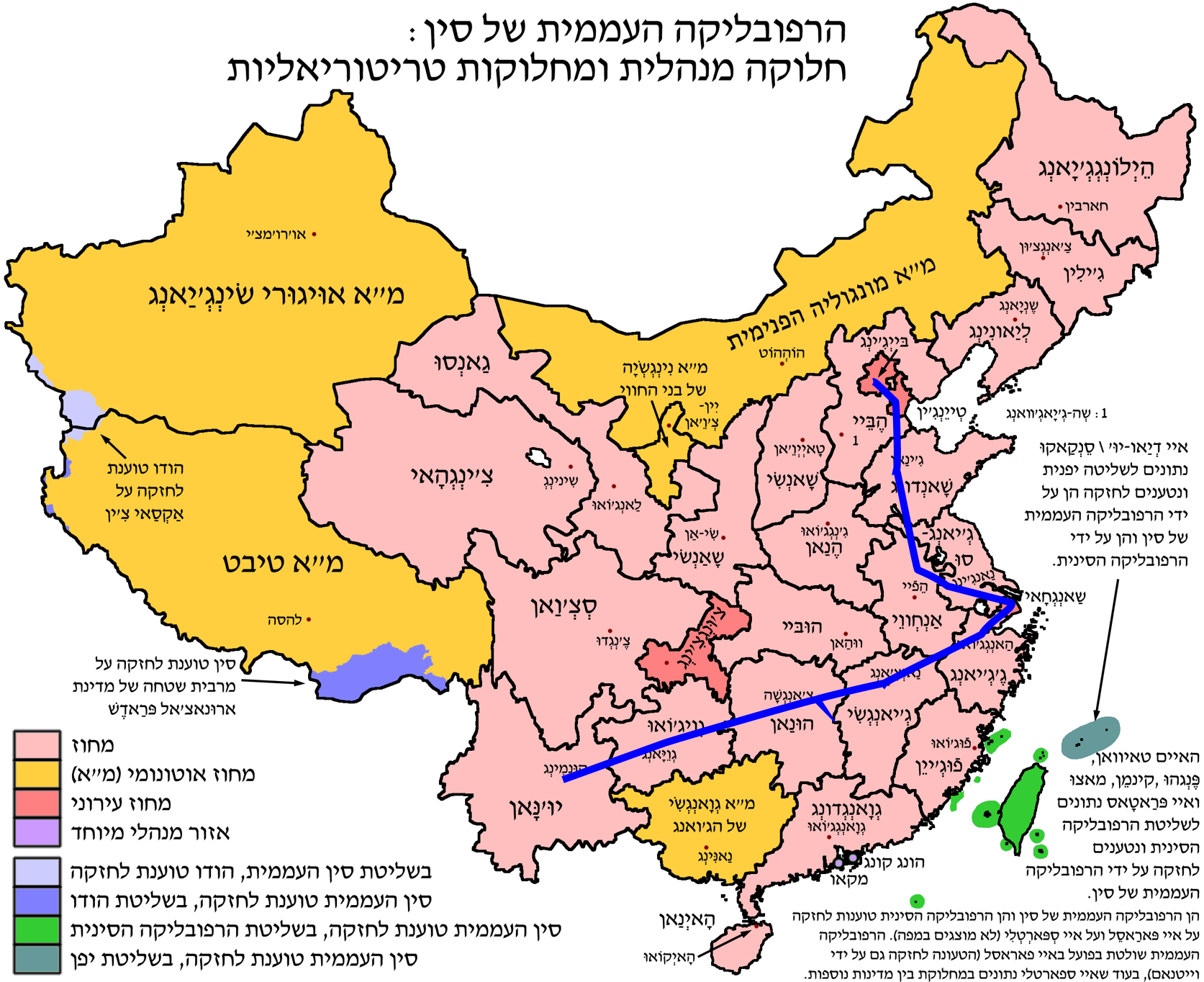 מסלול הרכבת שנגרי-לה של העולם